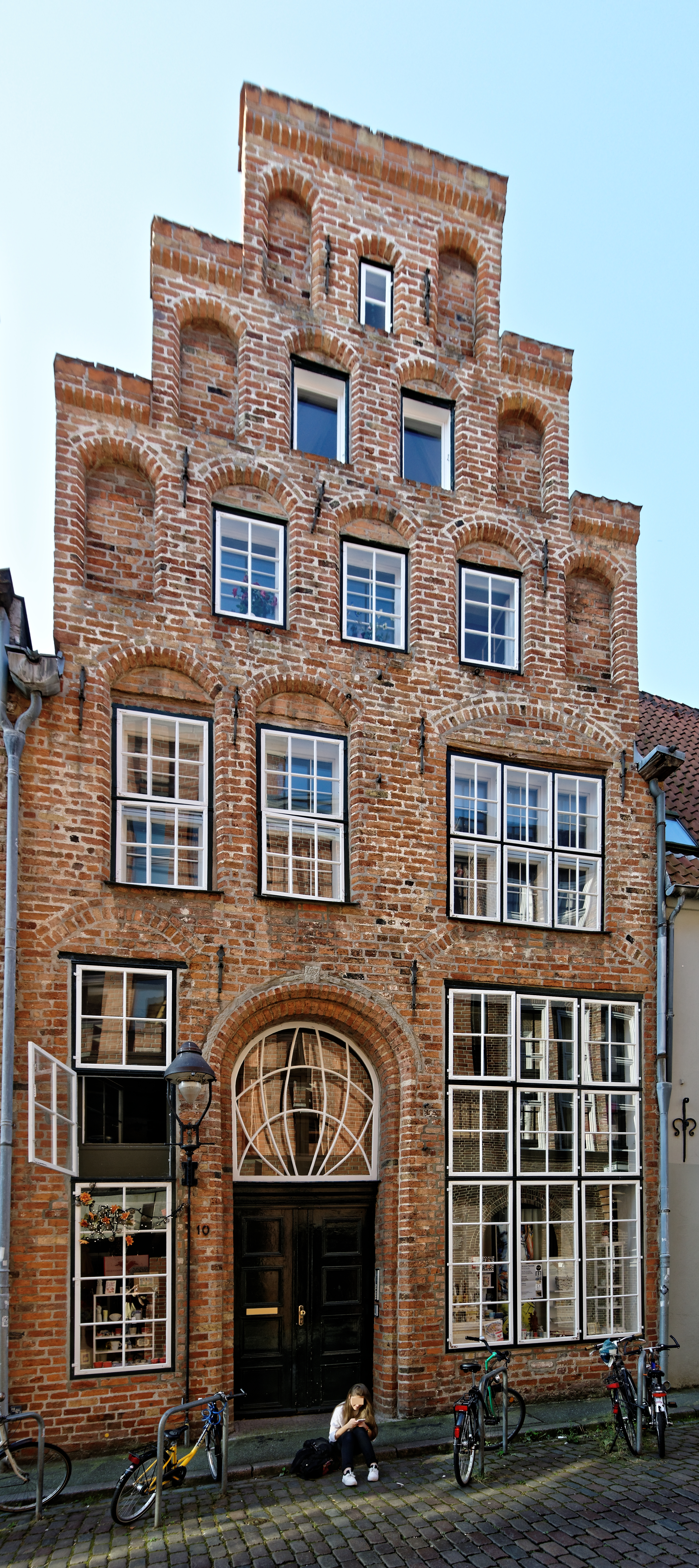 Lübecker Altstadt, Hundestraße 10